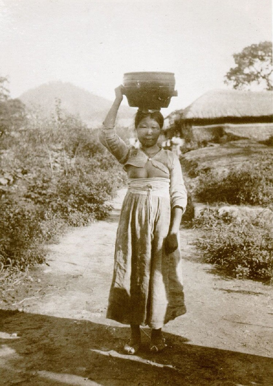 中文（香港）: 19世紀末的朝鮮婦女